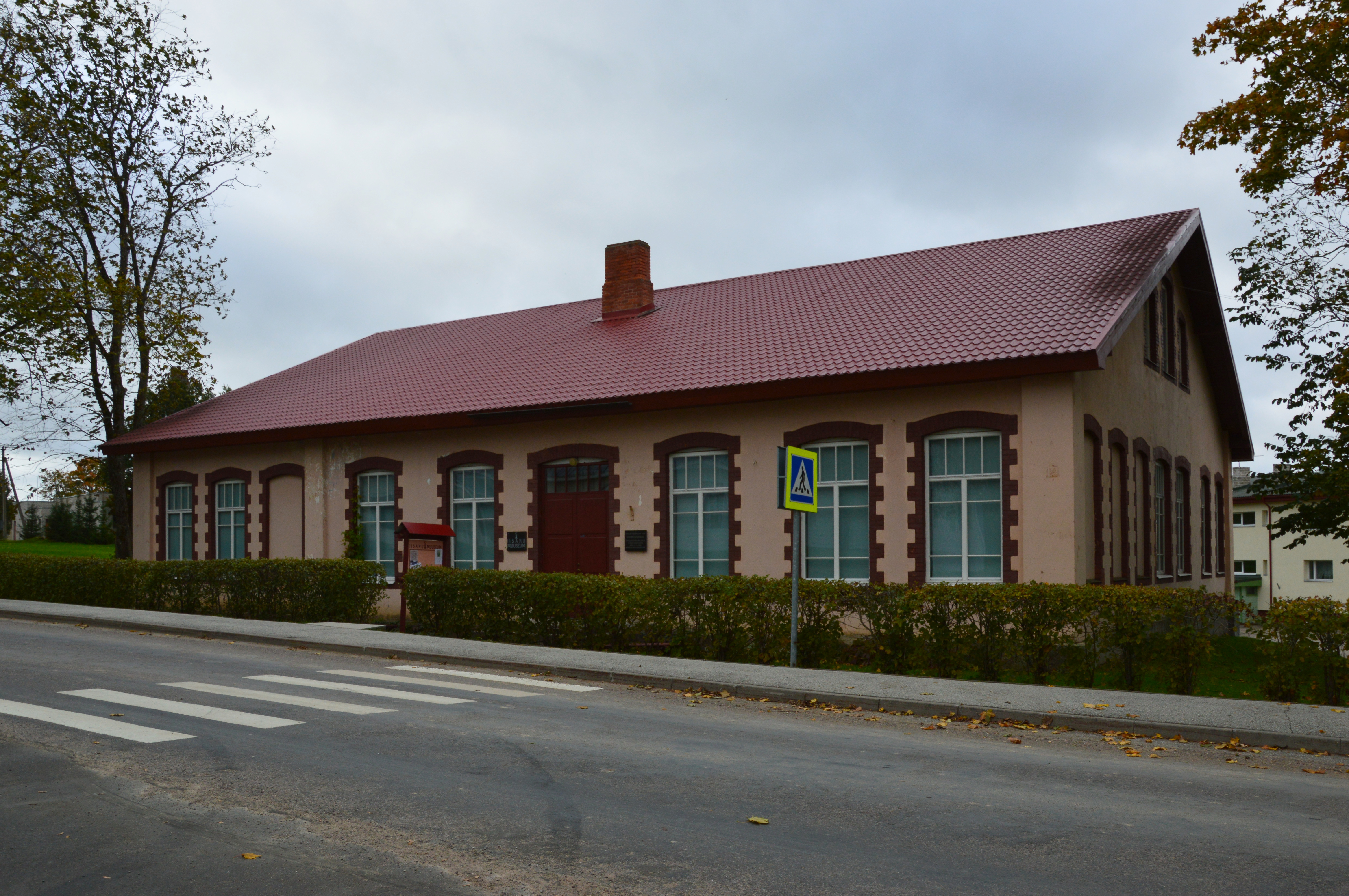 Iisaku muuseum